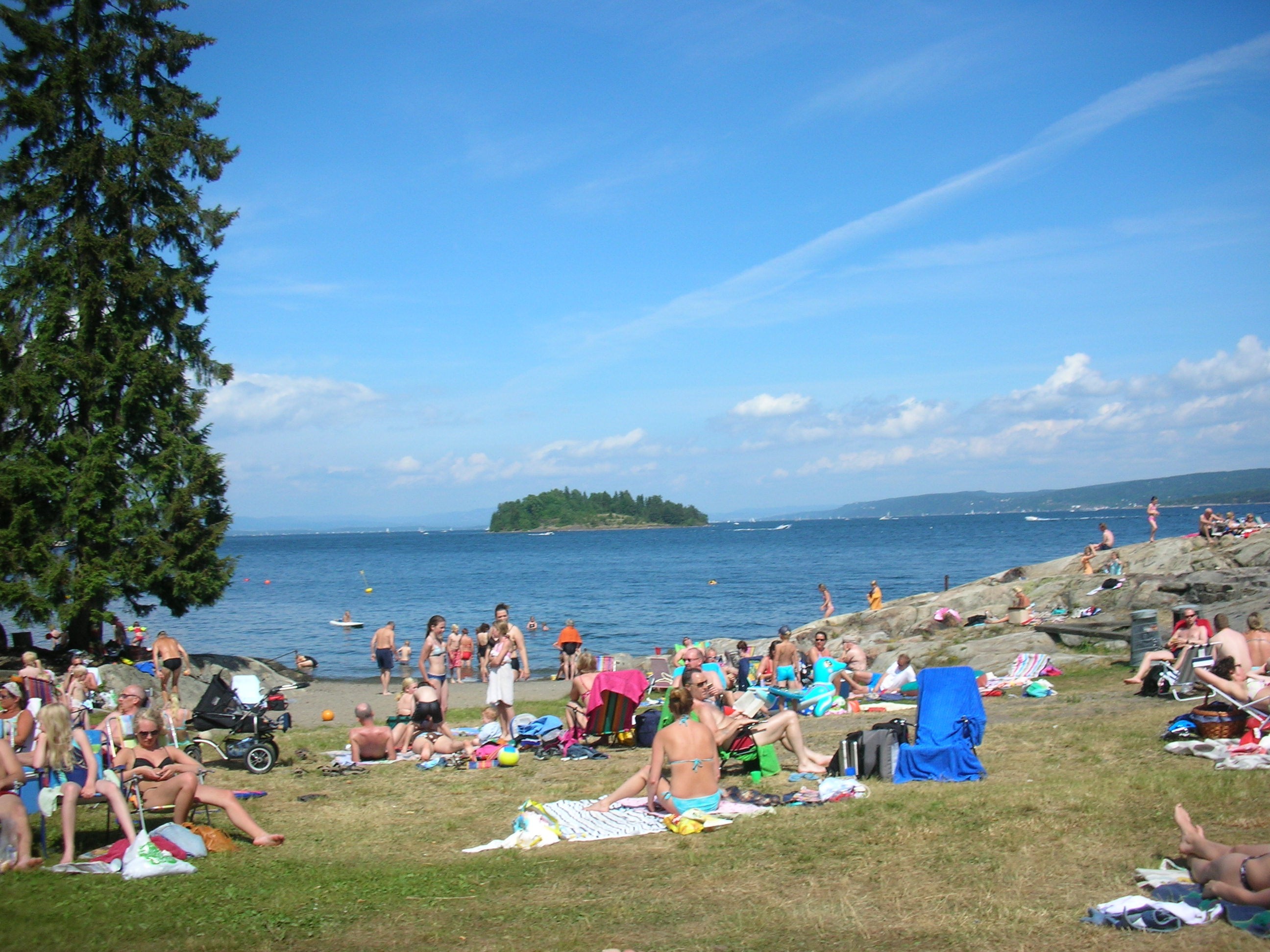 Høvikvollen i Båtsø/Røyken